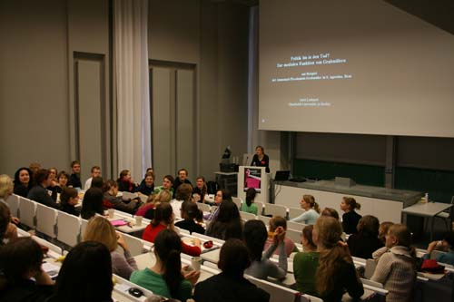 Kunsthistorischer Studierendenkongress, Berlin 2007